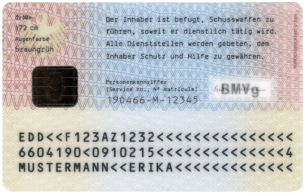 Elektronischer Dienstausweis für deutsche Bundesbehörden (eDA), Truppenausweis BMVg, Rückseite